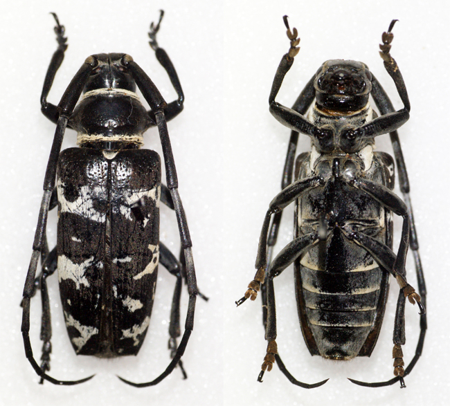 Heller,1915 Sex: Female Data: 07-2013 - Dingalan Aurora - North Luzon - Philippines Size: ?